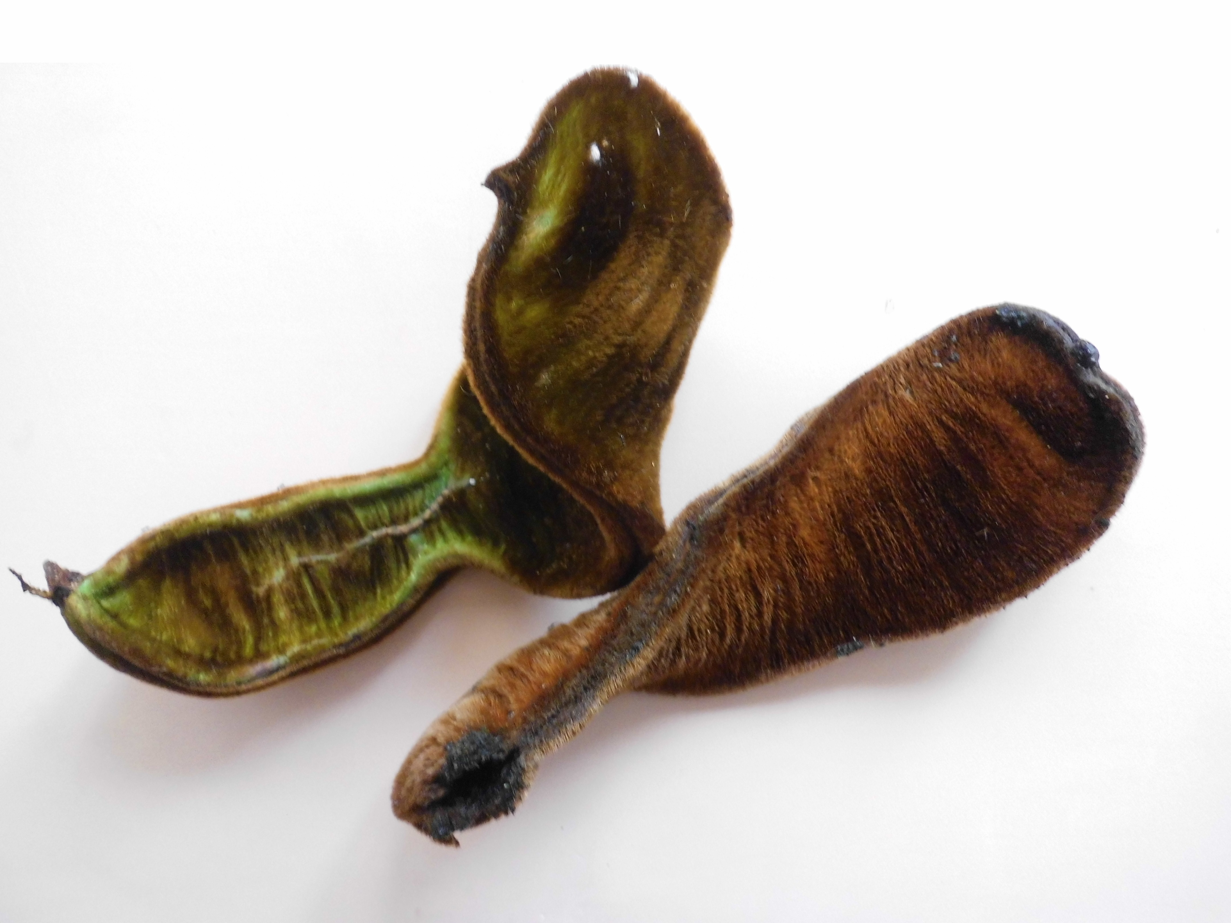 Inga fastuosa (Jacq.) Willd. localizadas en Los Pinos 1 municipio El Hatillo, estado Miranda Venezuela